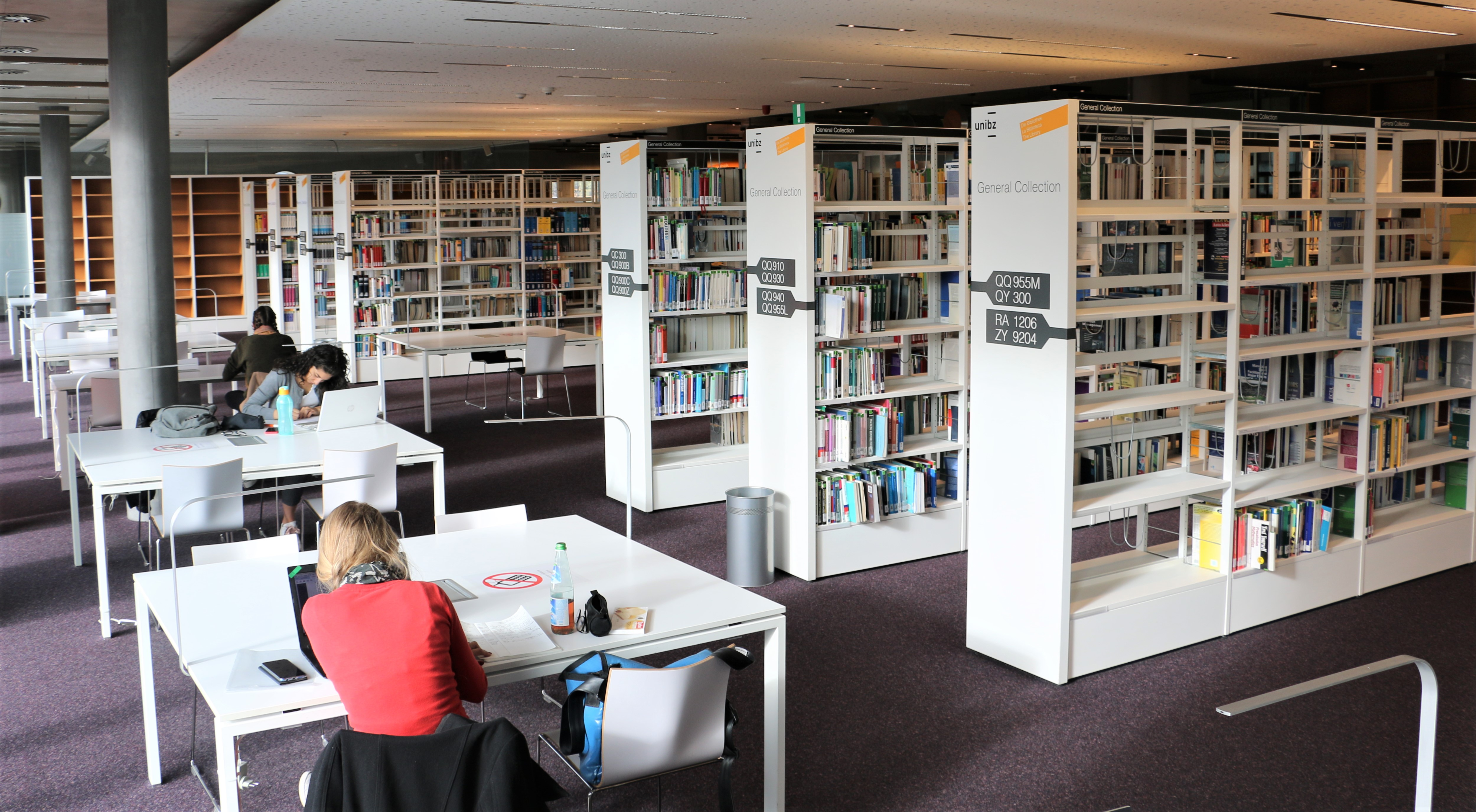 Innenansicht der Universitätsbibliothek in Bruneck mit Blick auf die Arbeitsplätze und Bücherregale